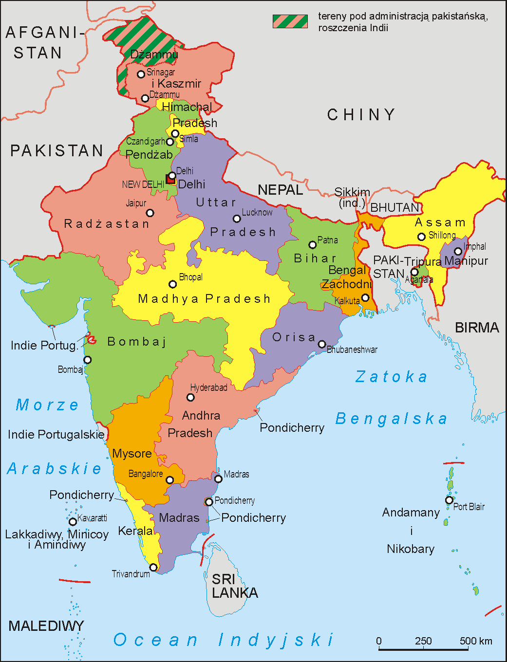 Podział administracyjny Indii w 1956 roku. Autor Aotearoa